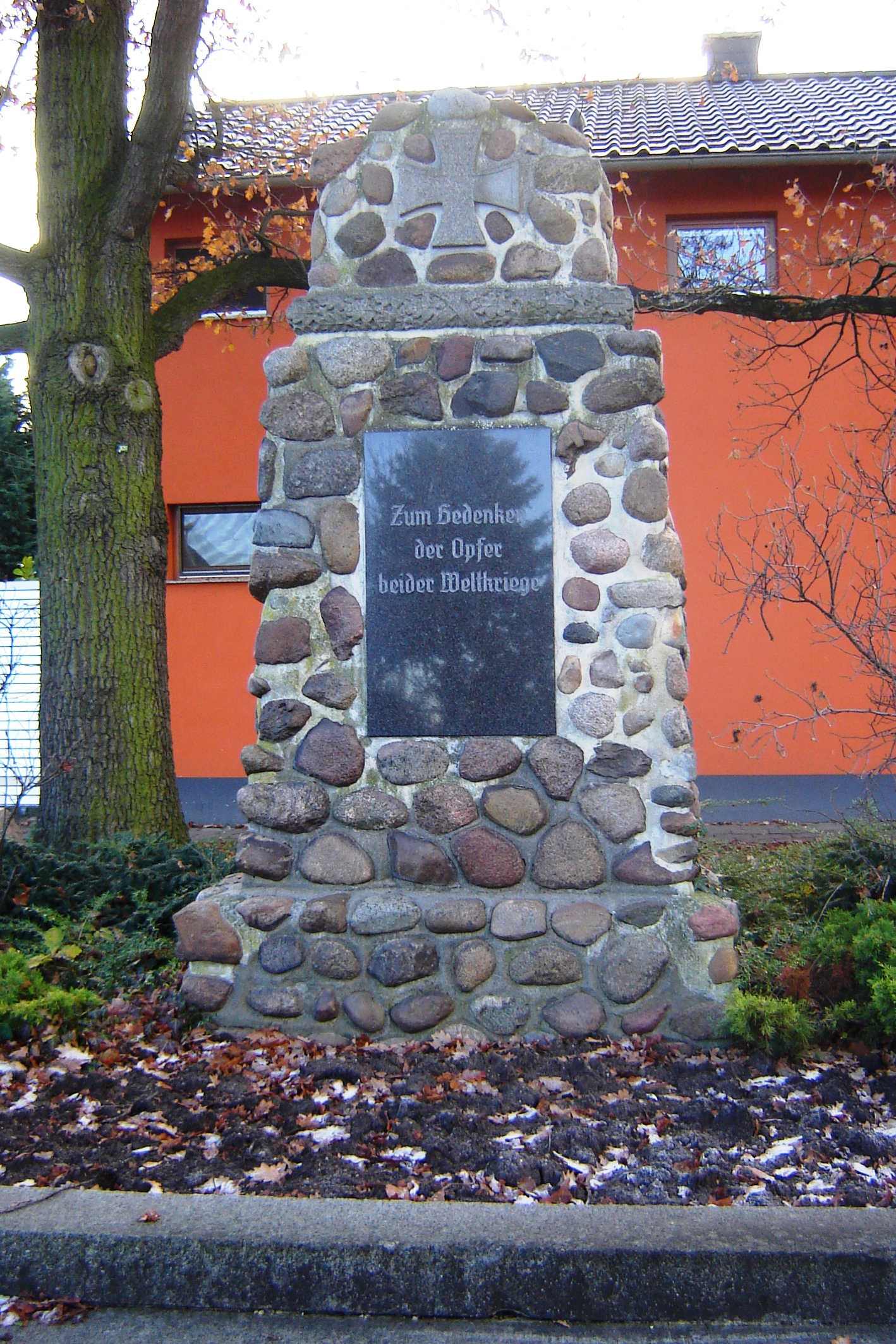 Pechau, Kriegerdenkmal (Kulturdenkmal)